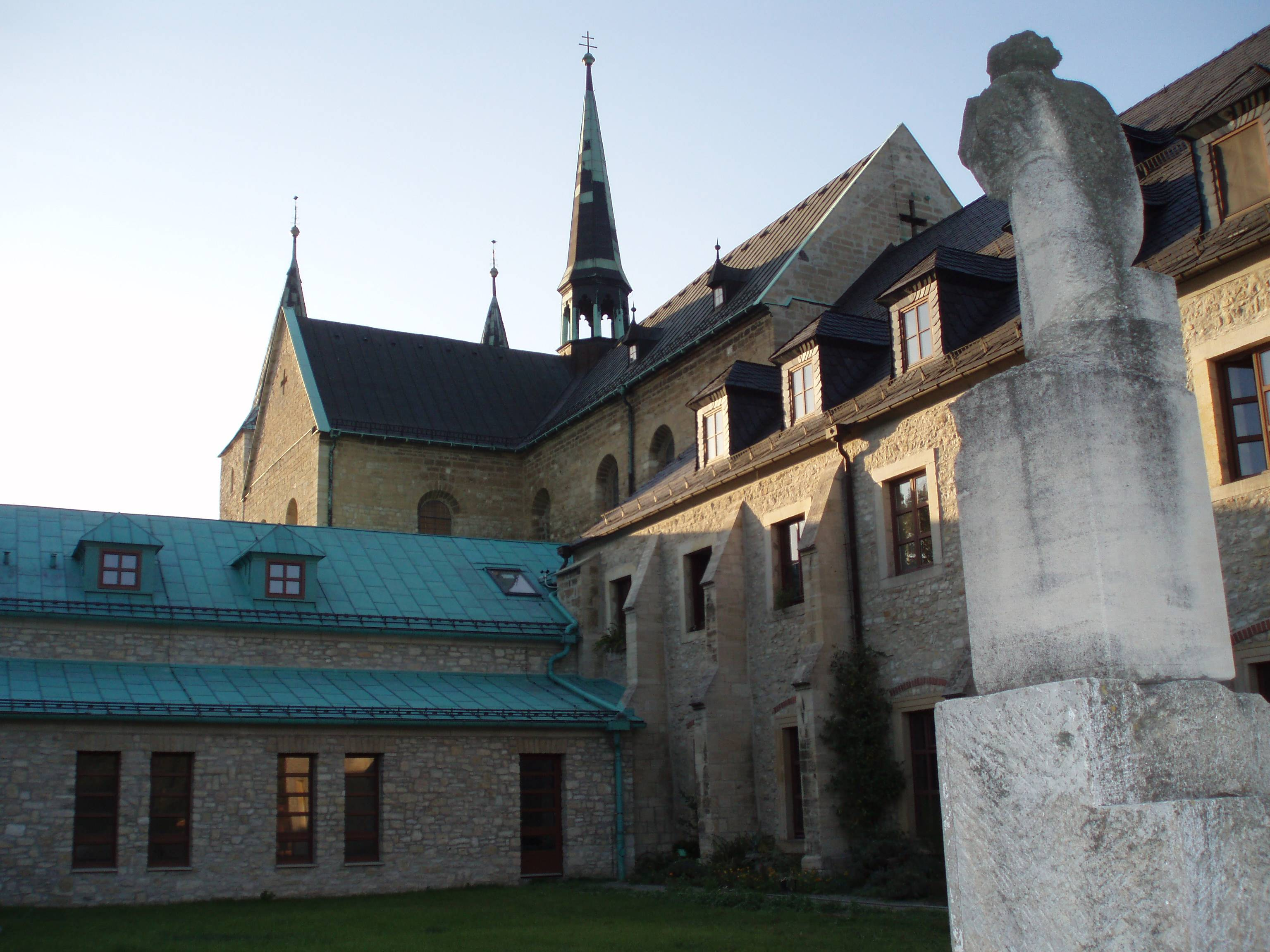 Kloster Huysburg